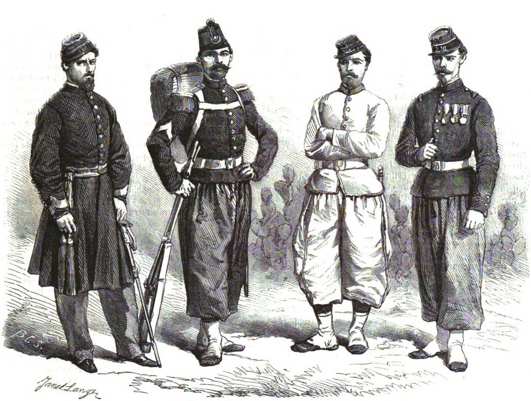 Armée de la République Argentine: Infantarie.